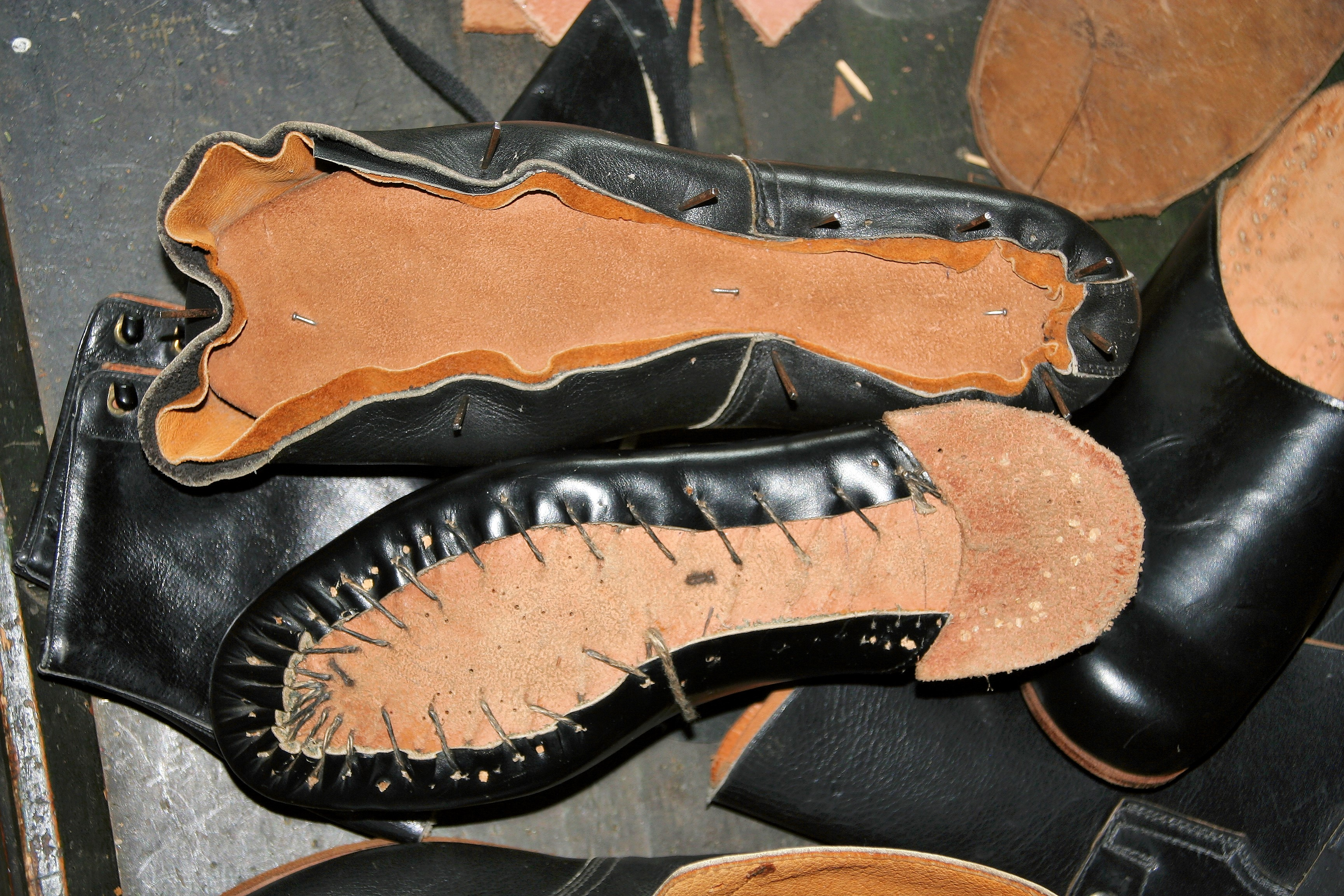 Herstellung von Schuhen, Nähen des Oberleders an die Brandsohle.